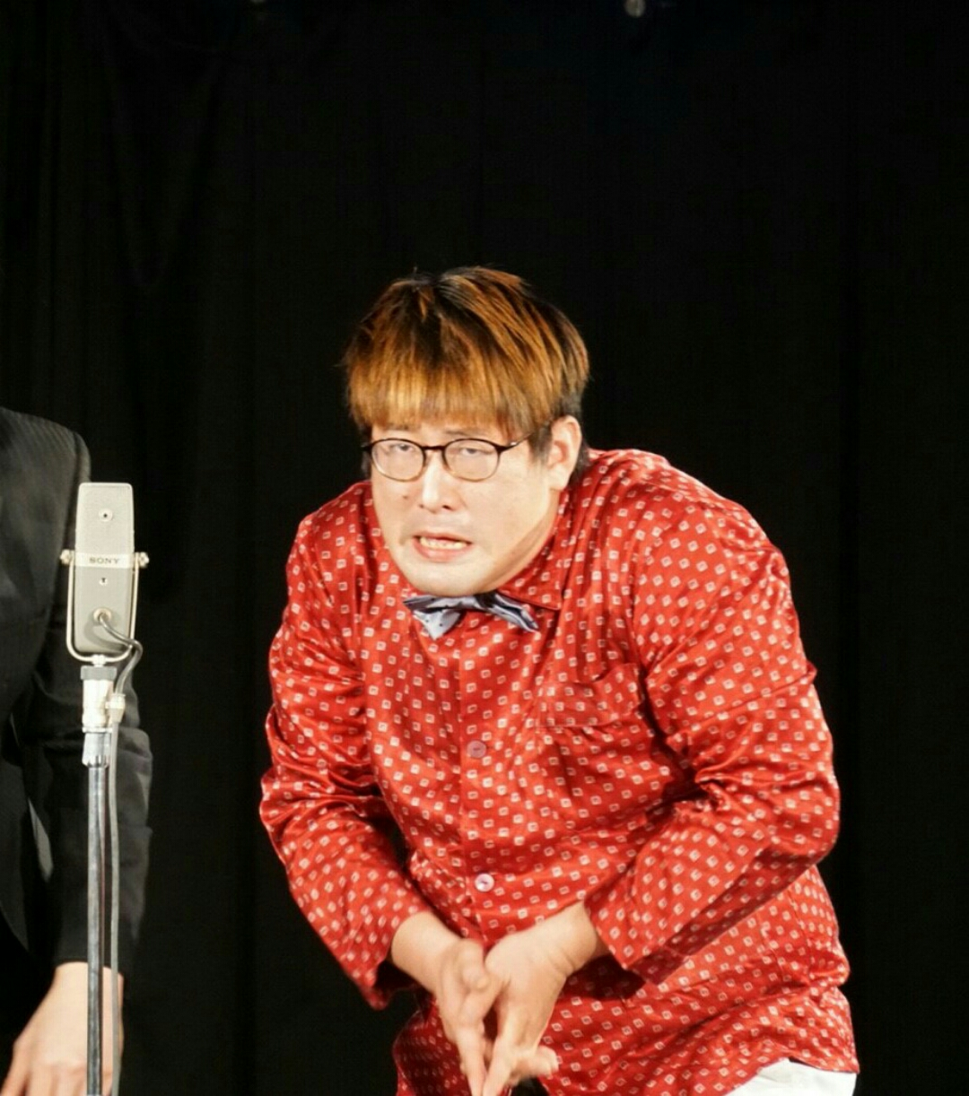 漫才で拳銃を撃とうとしているヤスコウチナオヤ